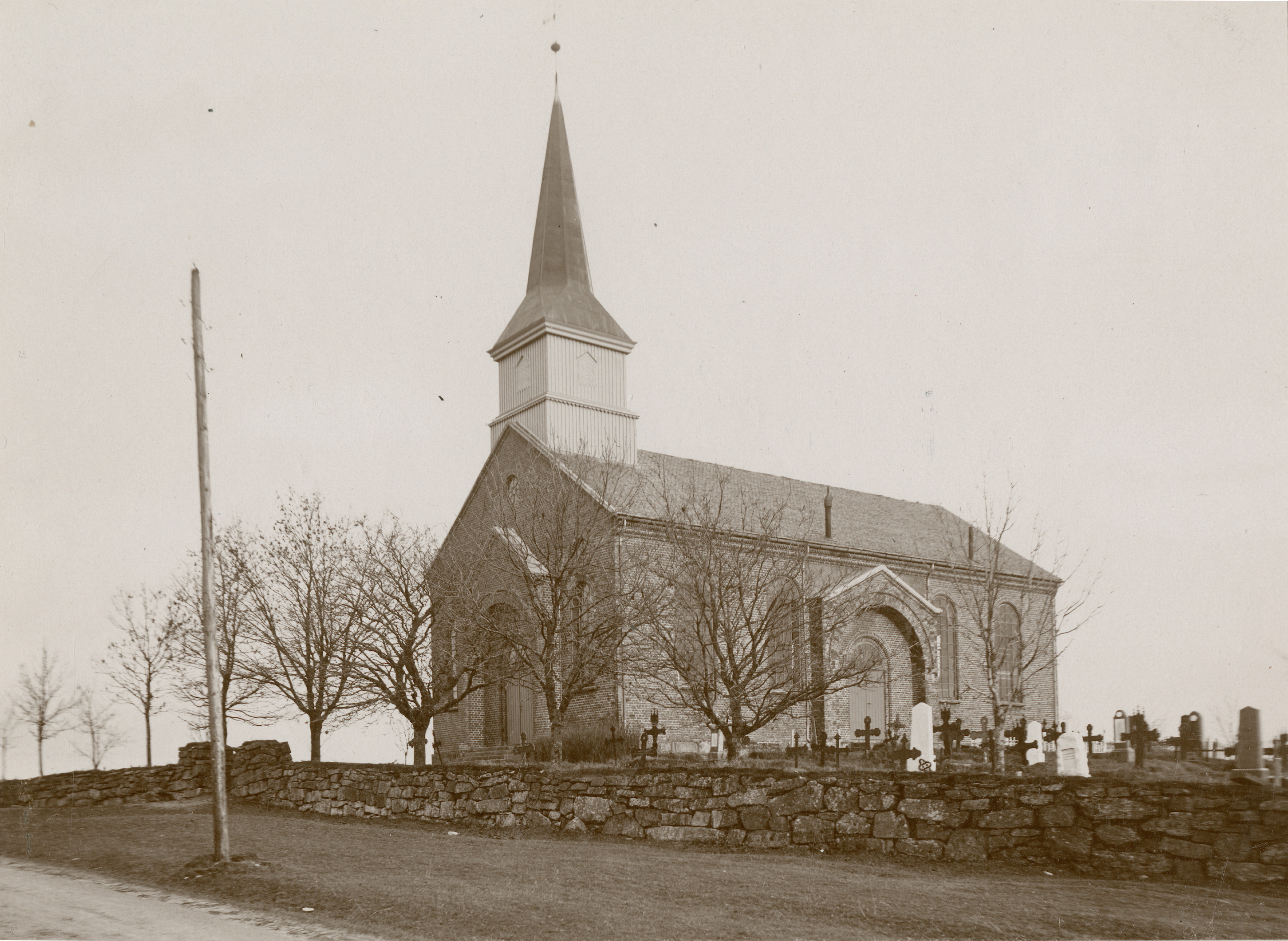 Degernes kirke i Degernes, Østfold This image on crowdsourcing geotagging platform Fotodugnad